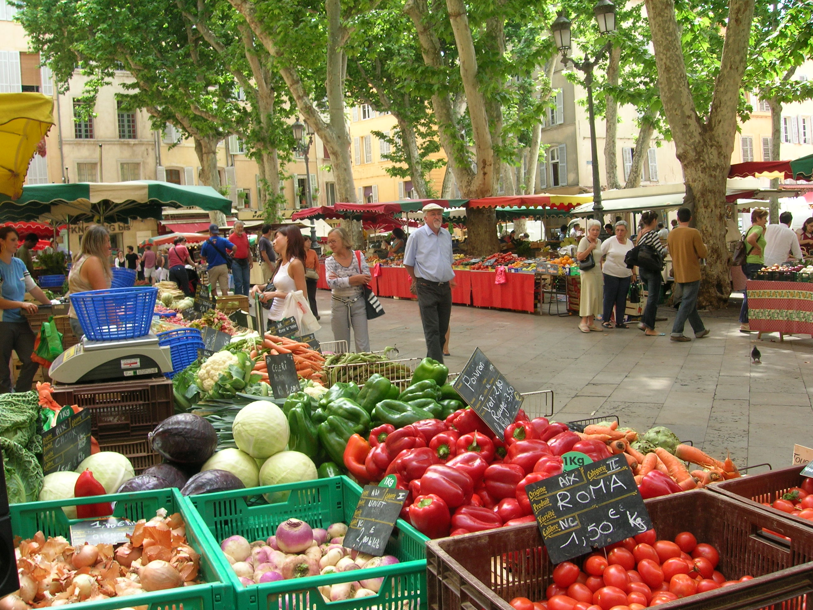 Maart zu Aix-en-Provence